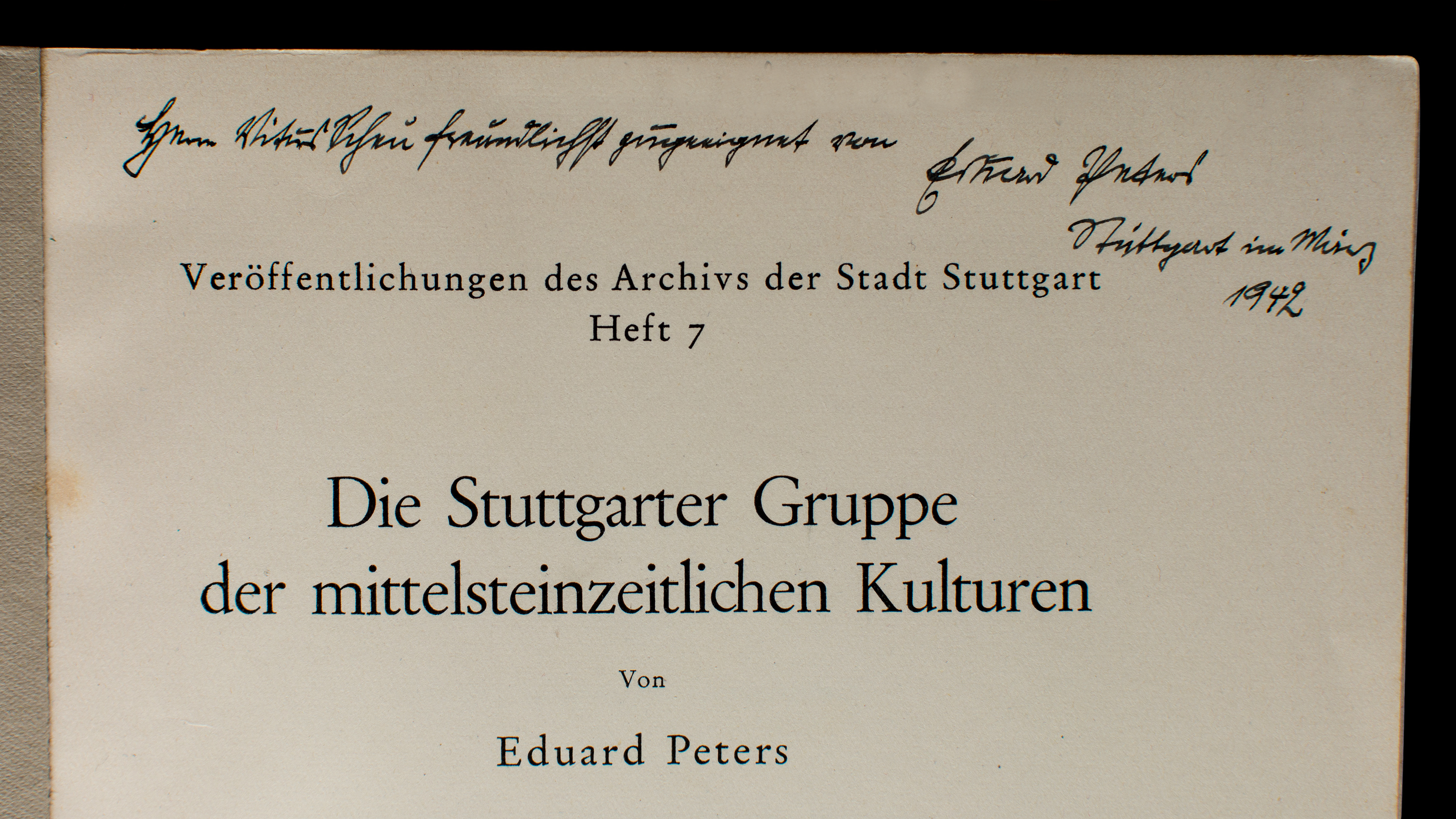 Handschriftlicher Vermerk und Signatur Eduard Peters' in einer Publikation des Stuttgarter Archivs, datiert auf März 1942. (Herrn Vitus Scheu freundlichst zugeeignet von Eduard Peters Stuttgart im März 1942)